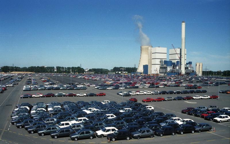 Juni 1988 Wolfsburg, Volkswagenwerk, 27 Computergesteuerte Qualitätskontrolle